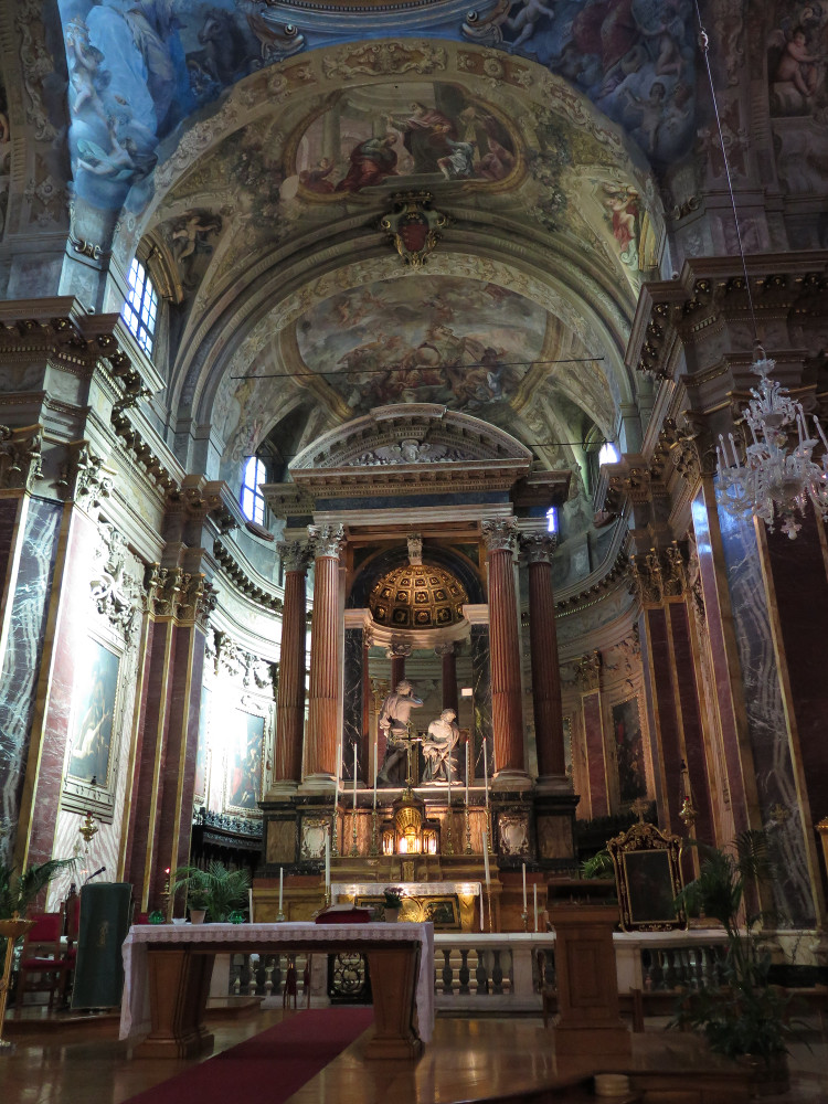 Chiesa di San Paolo Maggiore This is a photo of a monument which is part of cultural heritage of Italy.